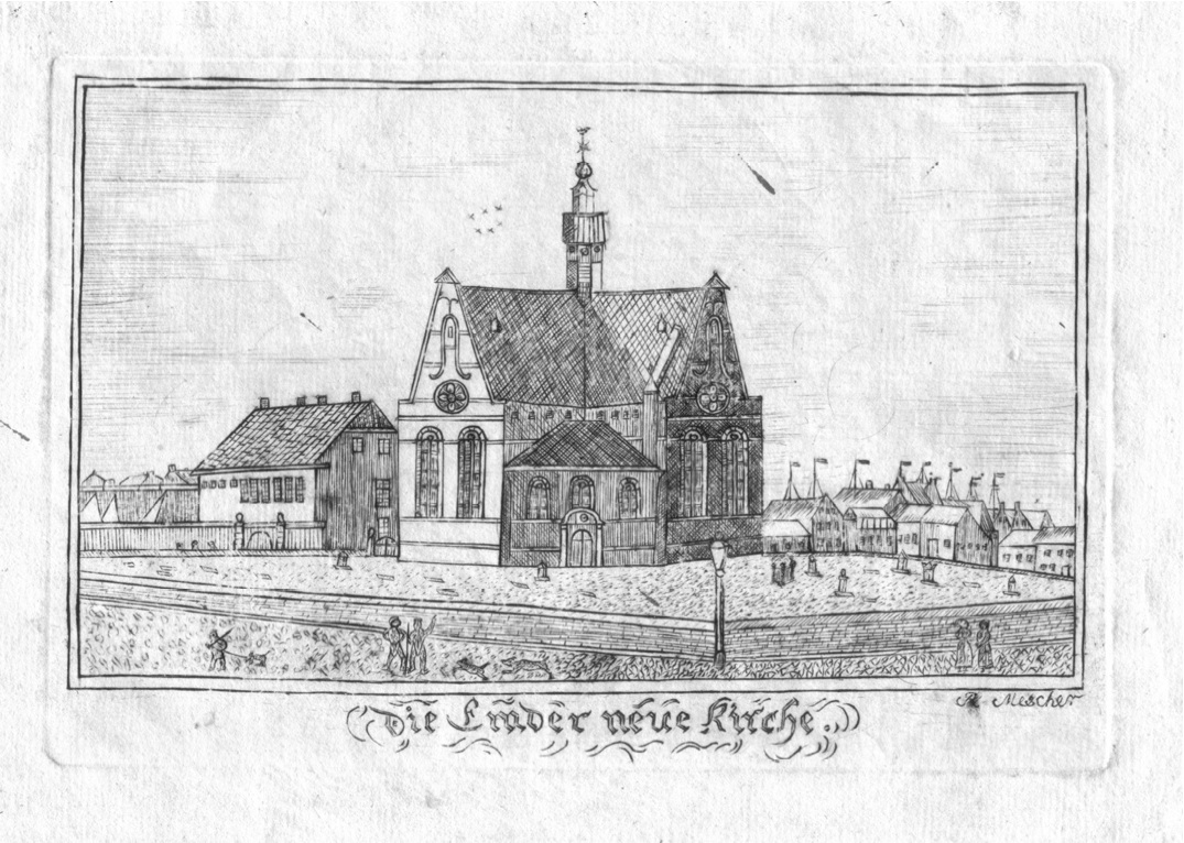 R. Mescher, Die neue Kirche in Emden, 1826, Ostfriesisches Landesmuseum Emden, GS Kunst 3388